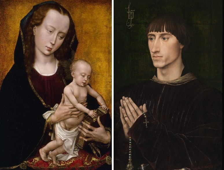 Fotocomposició del Díptic de Philippe de Croy, obra de Rogier van der Weyden, actualment separat en dues taules.